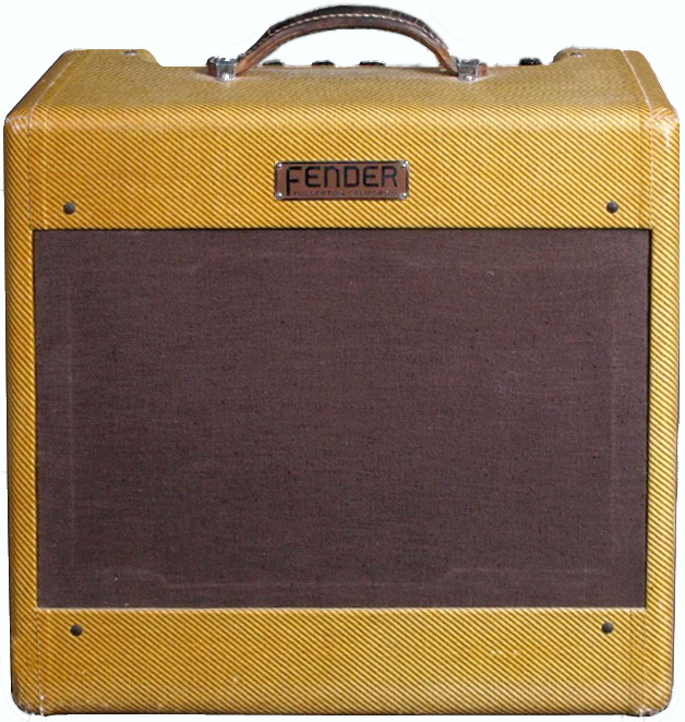 Fender Guitar Amplifier - 1953 Deluxe